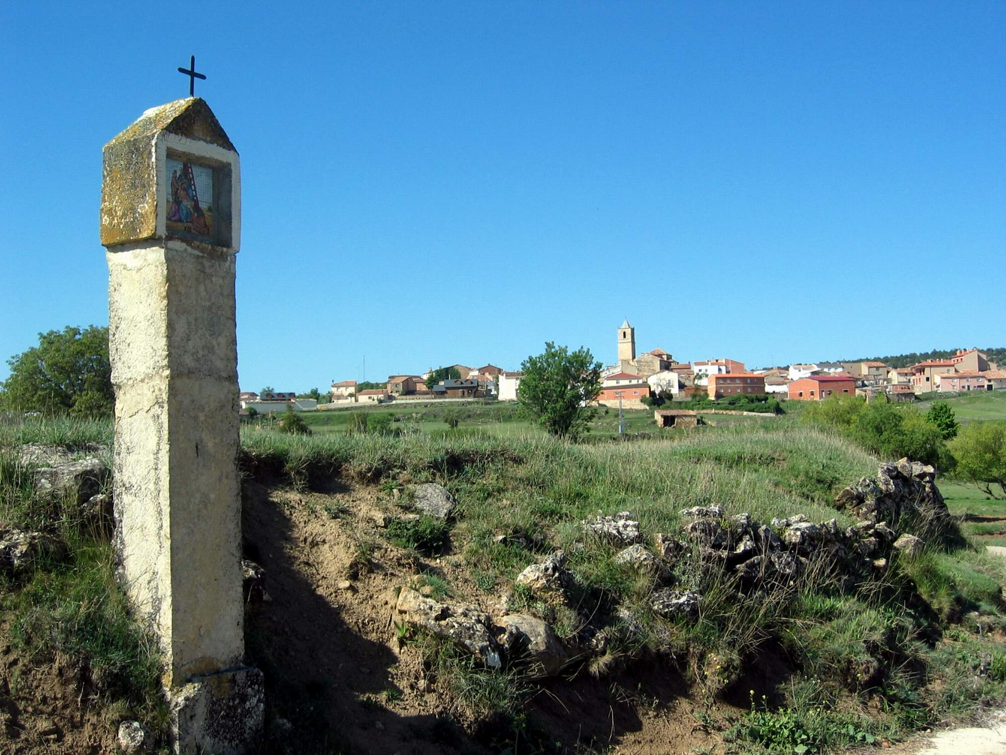 Vista parcial de Fuentelespino de Moya (Cuenca), con detalle del pilón correspondiente a la Estación XIII del Viacrucis: Jesús es bajado de la cruz.